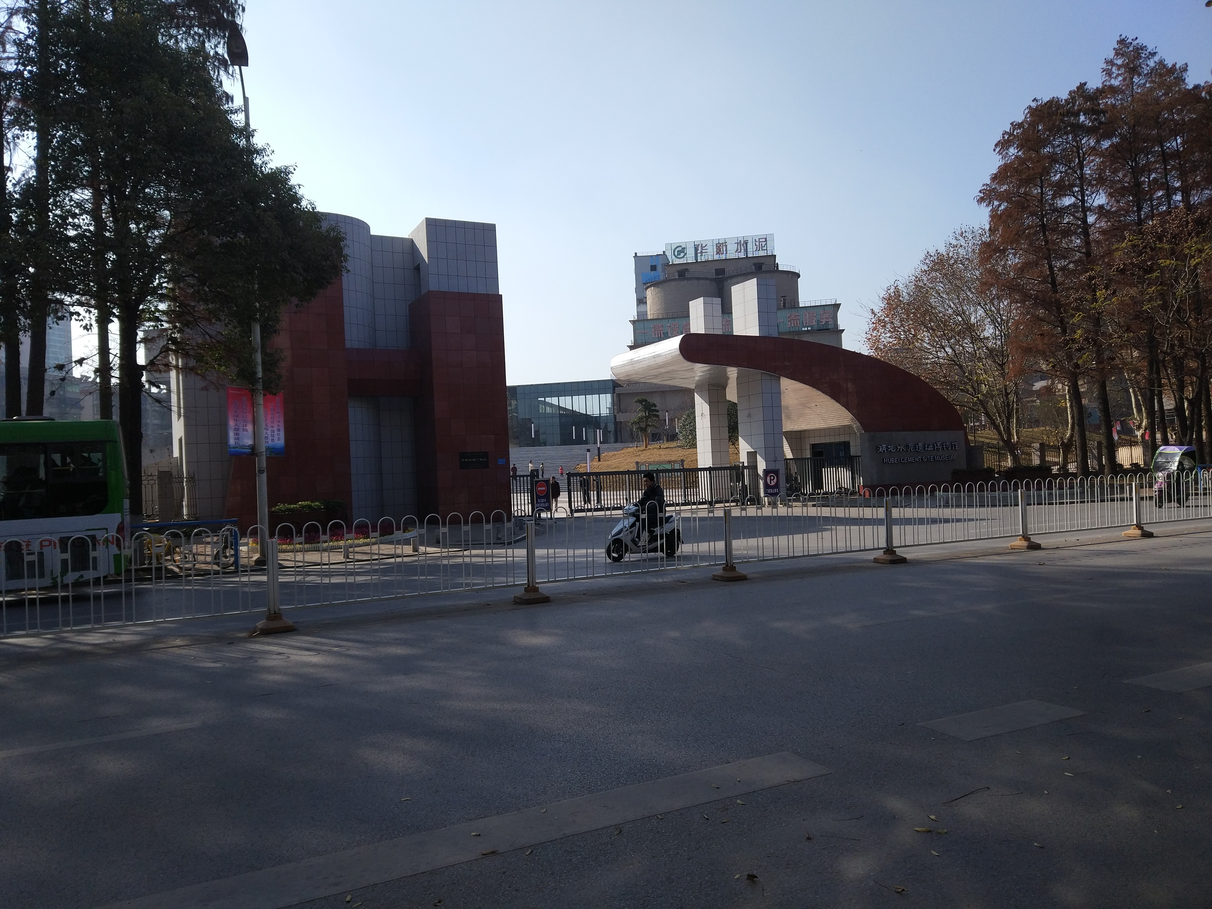 湖北水泥遗址博物馆